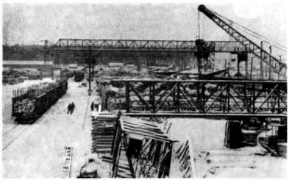 кран